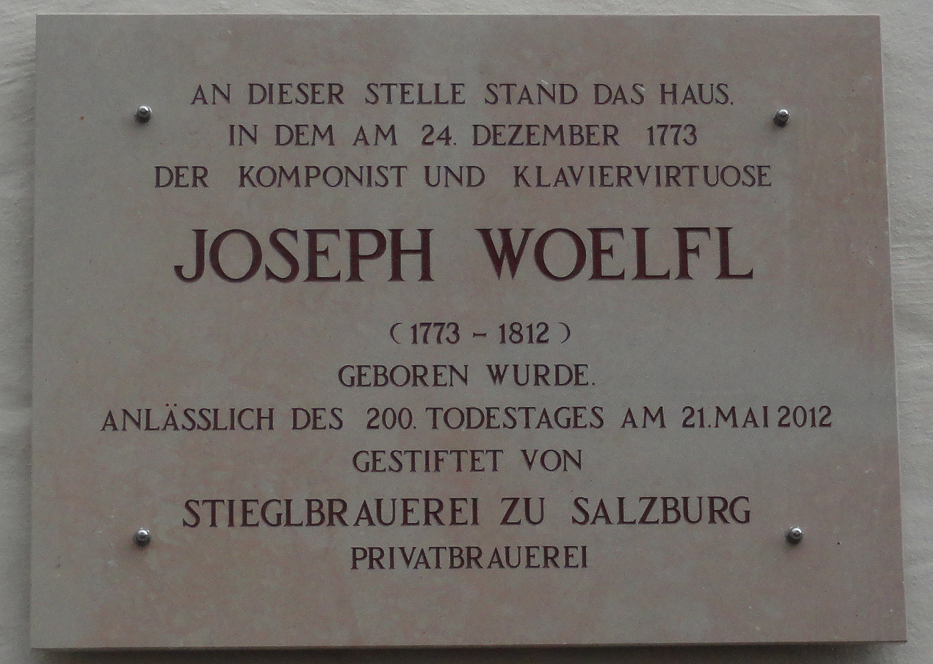 Joseph Woelfl Gedenktafel am Geburtshaus, enthüllt am 17. Mai 2012 in Salzburg